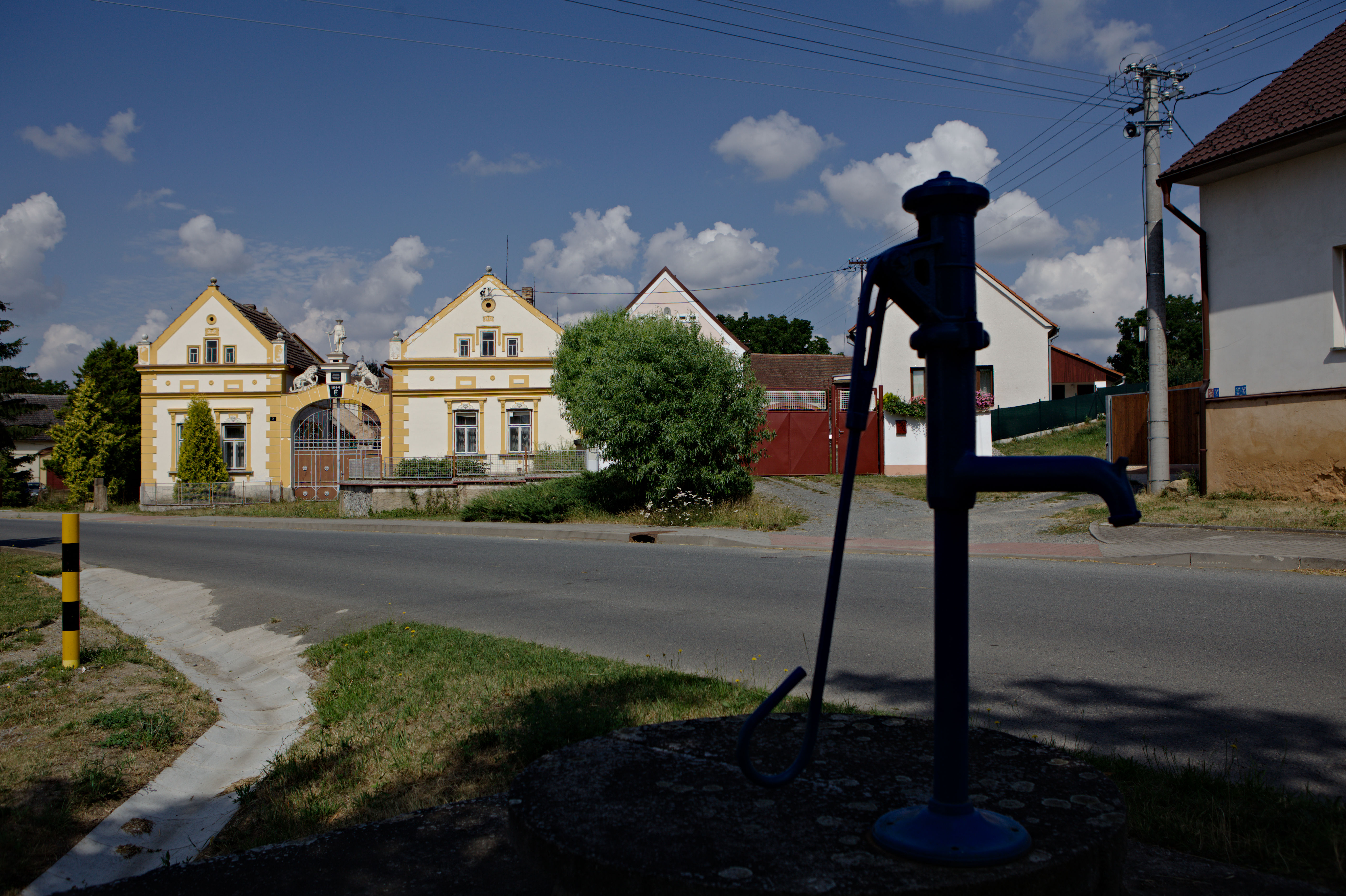 Žilov, pumpa na návsi a statek č.p. 7